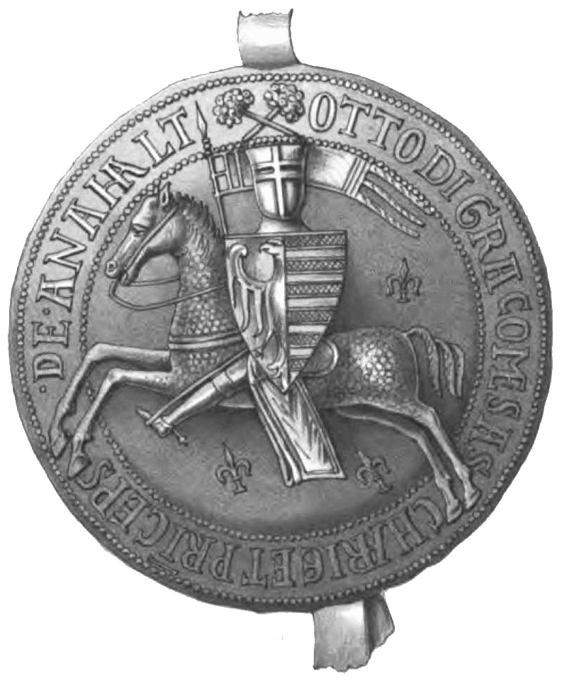 Ältestes Reitersiegel des Fürsten Otto I. von Anhalt (Original veröffentlicht im Codex diplomaticus anhaltinus, Band 2)